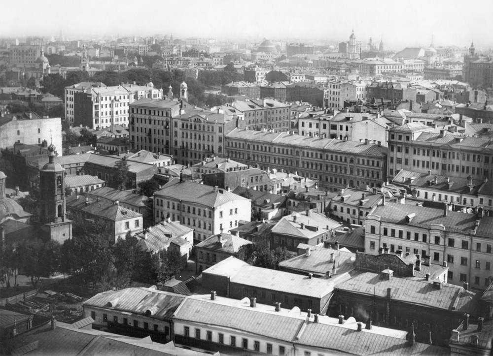 Вид в сторону Красных ворот, Чистых прудов и Лефортова